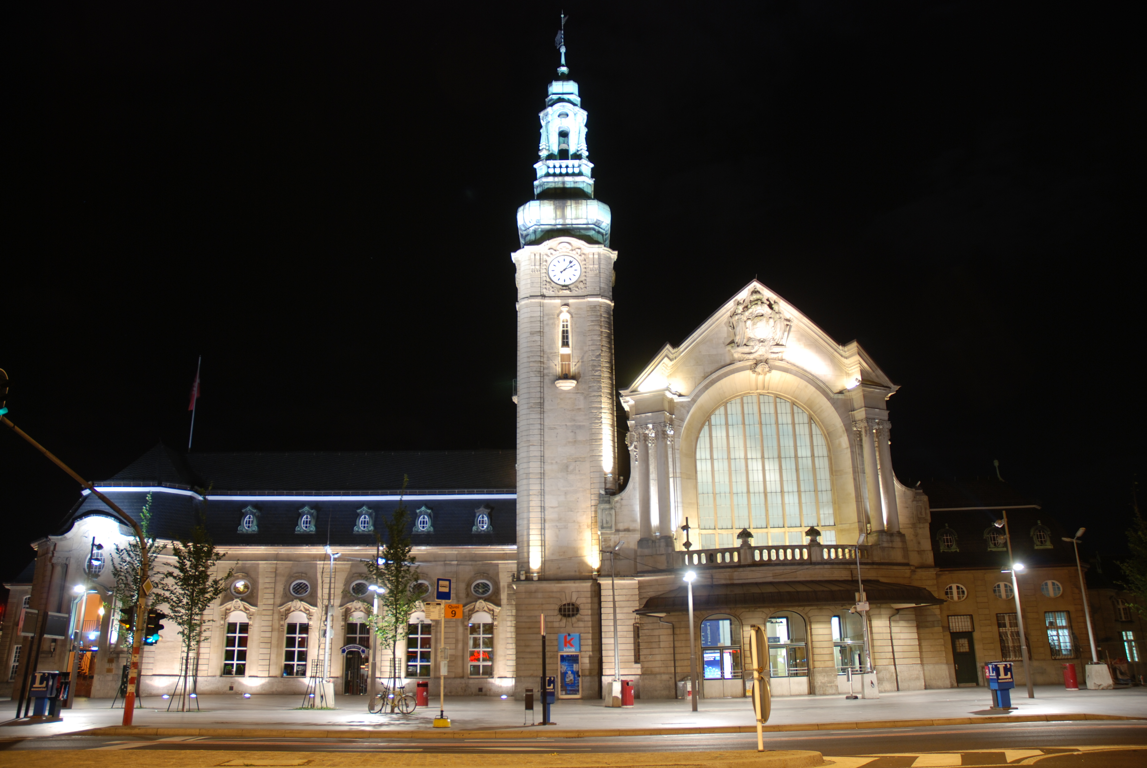 Ansicht des Bahnhofes bei Nacht